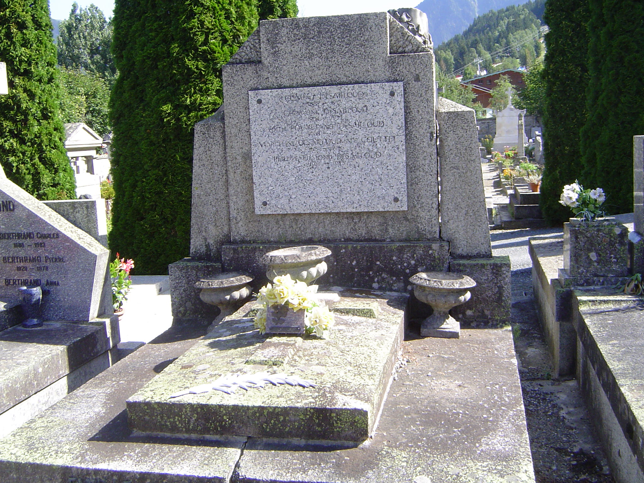 Photo prise au cimetière de Chamonix-Mont-Blanc (France)